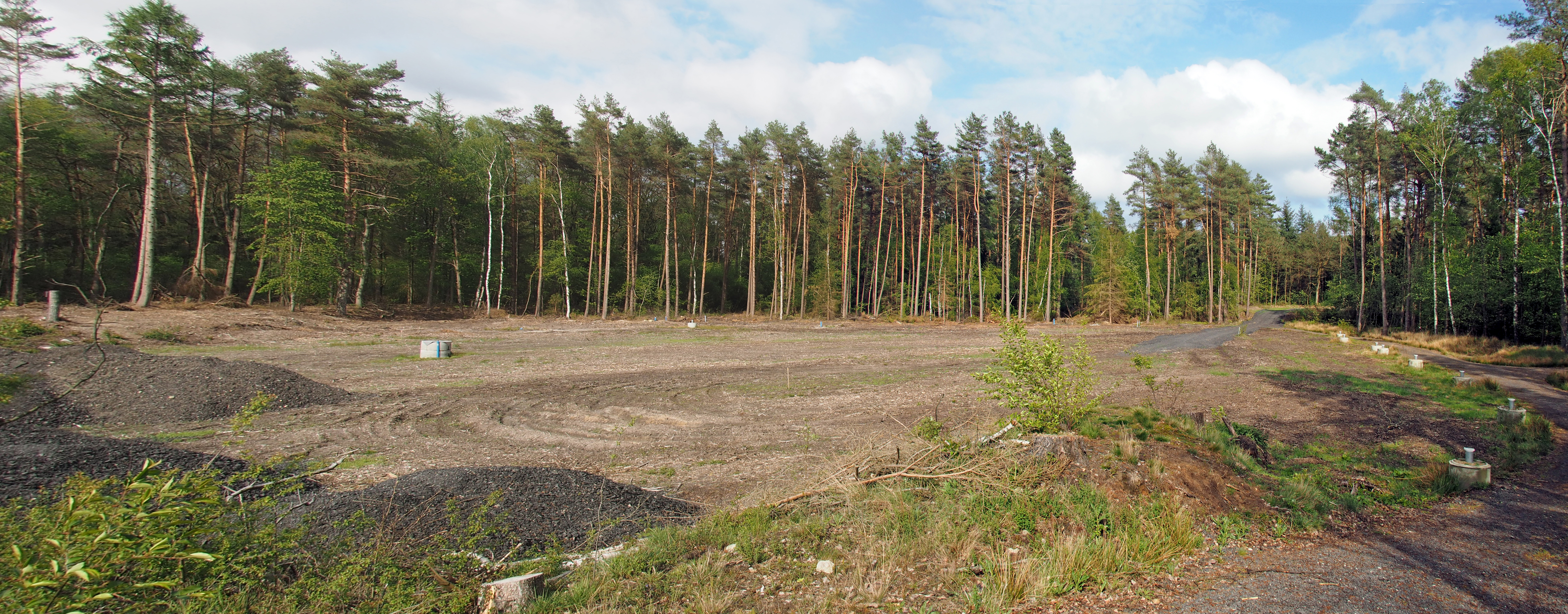 Areal des Dethlinger Teiches – Hier lagern Sprengstoff-Altlasten der ehemaligen Lufthauptmunitionsanstalt 4/XI Oerrel